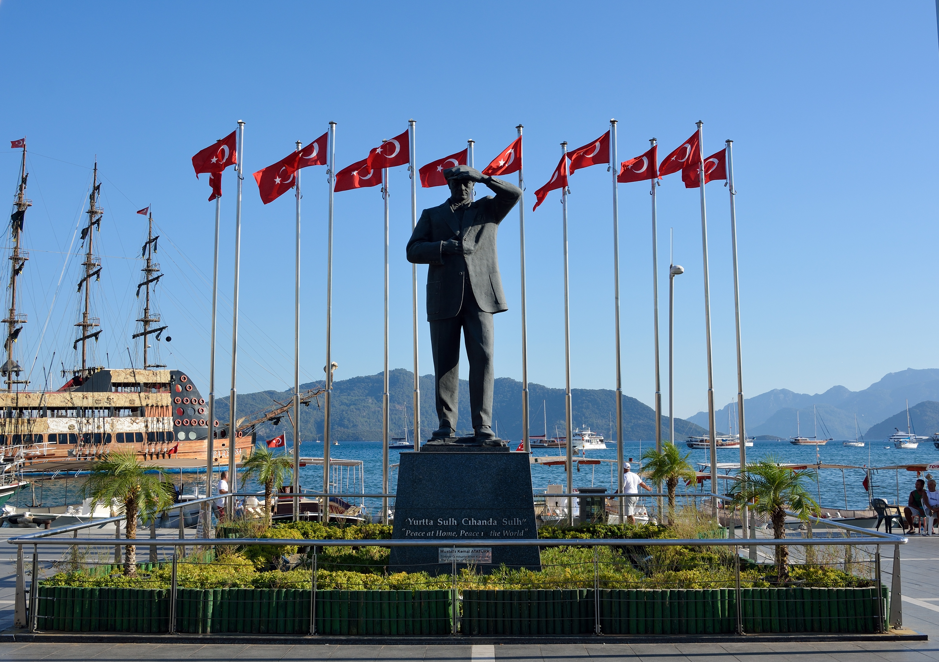 Памятник Кемалю Ататюрку на набережной Мармариса